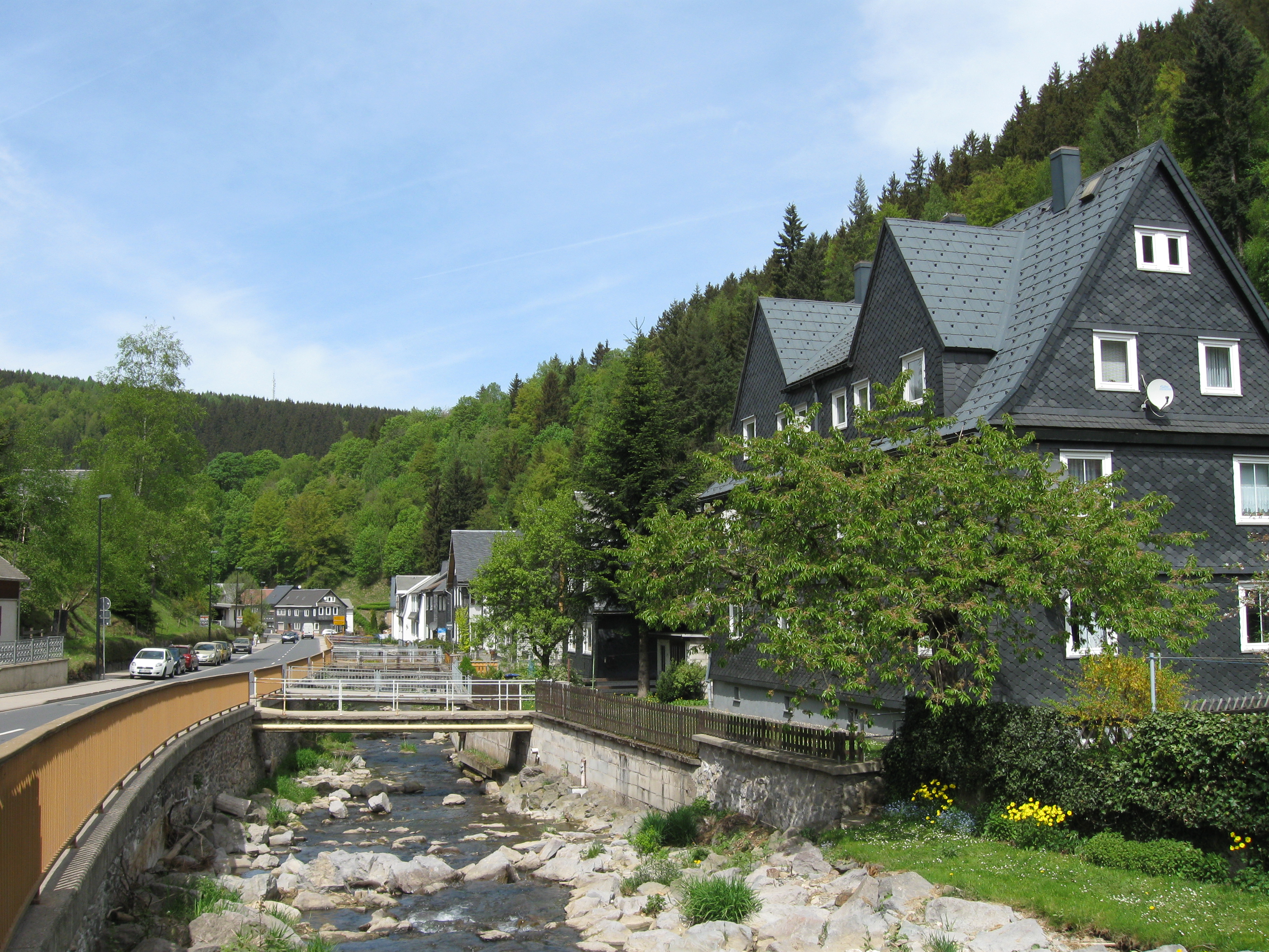 Brücken über die Katze zu Wohngrundstücken in der Neuhäuser Straße in Katzhütte.